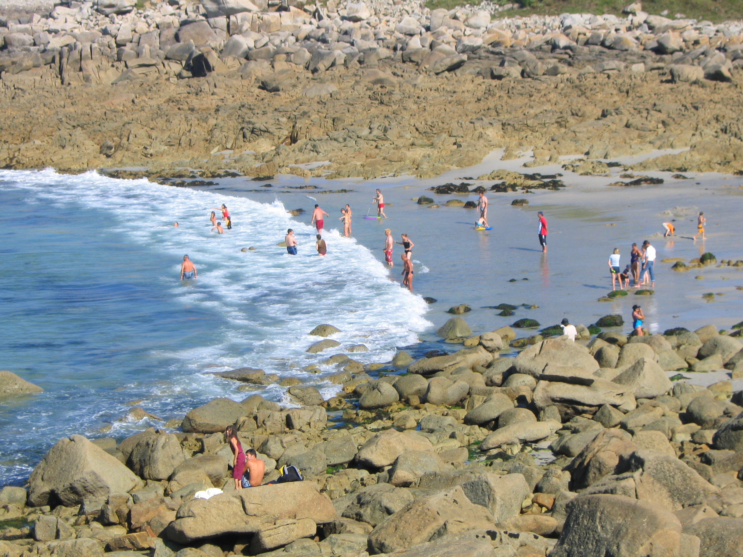 Plage de Groac'h zu, dans le Finistère (France)